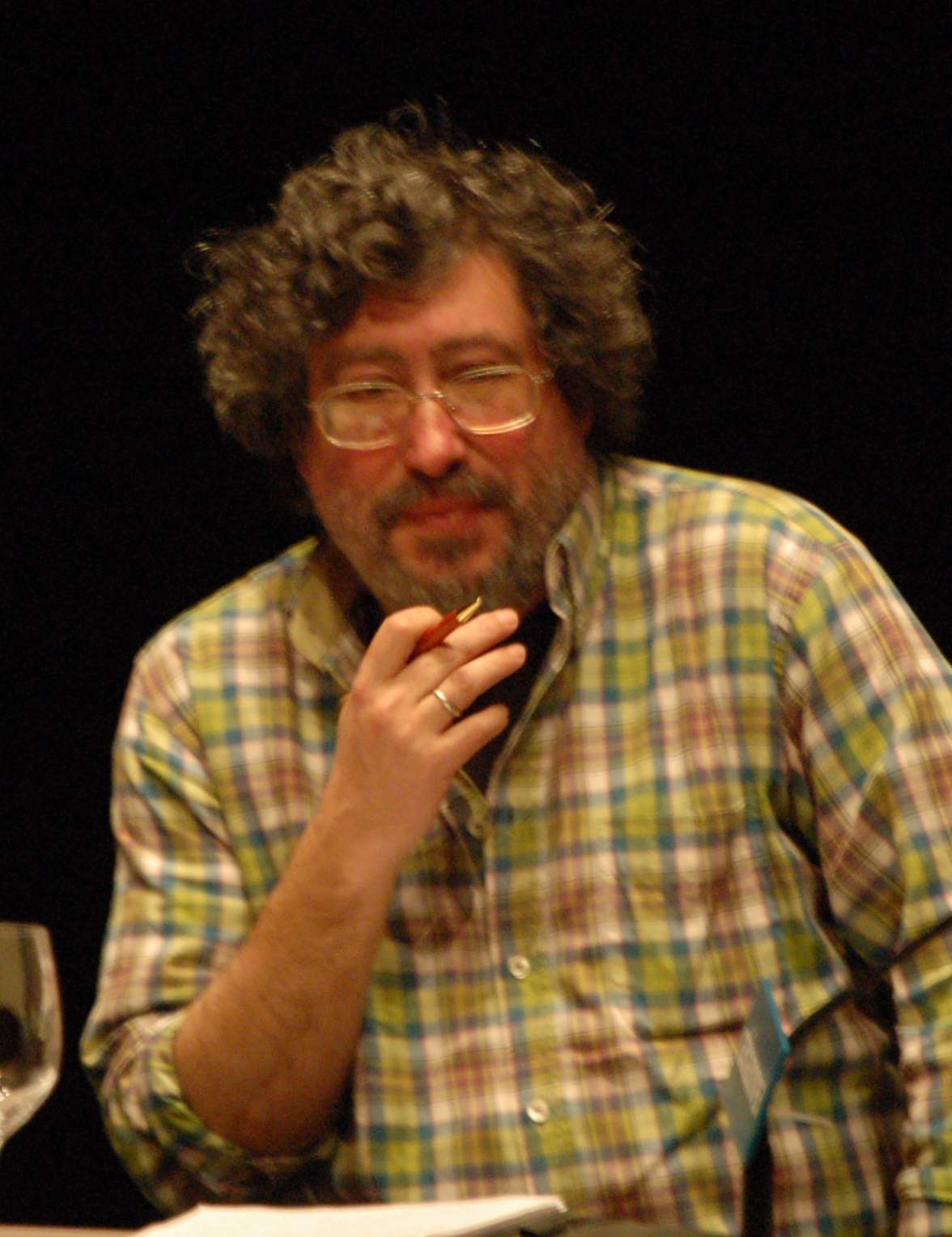 Dionisio Pereira na XXVII Semana Galega de Filosofía